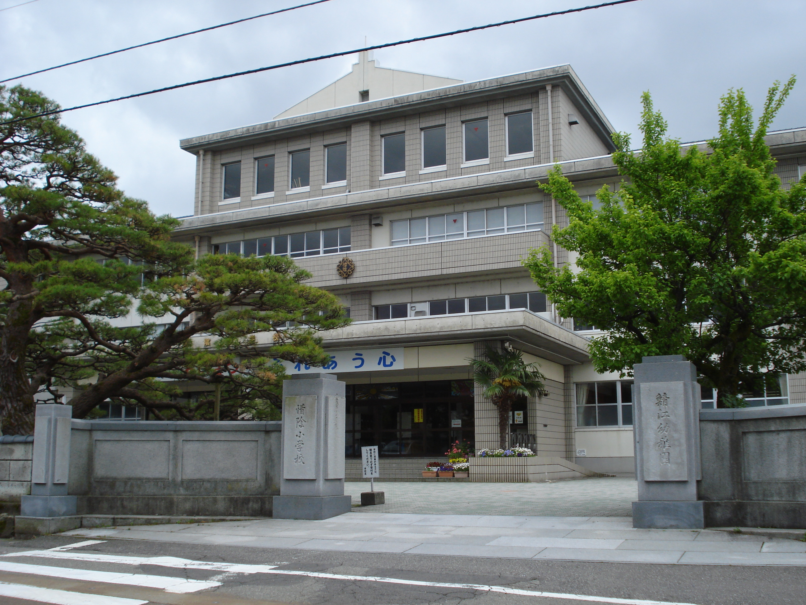 鯖江市立惜陰小学校